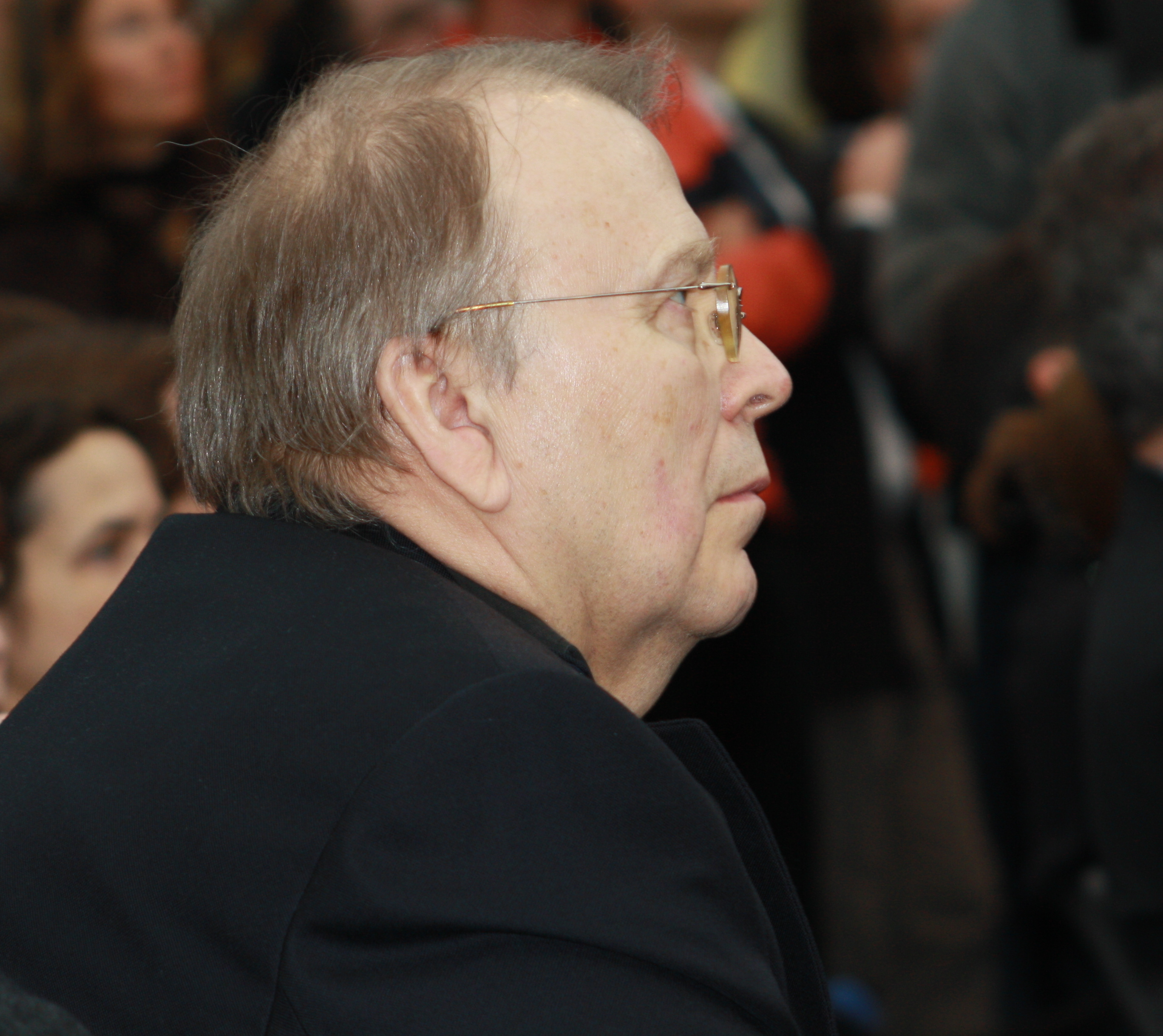 Wilhelm Genazino (deutscher Schriftsteller)